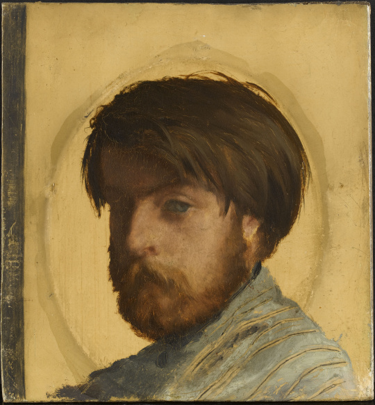 Jean-Louis Hamon (1821-1874), Portrait du peintre Auguste Toulmouche (1829-1890), huile sur bois, Dijon, musée Magnin.